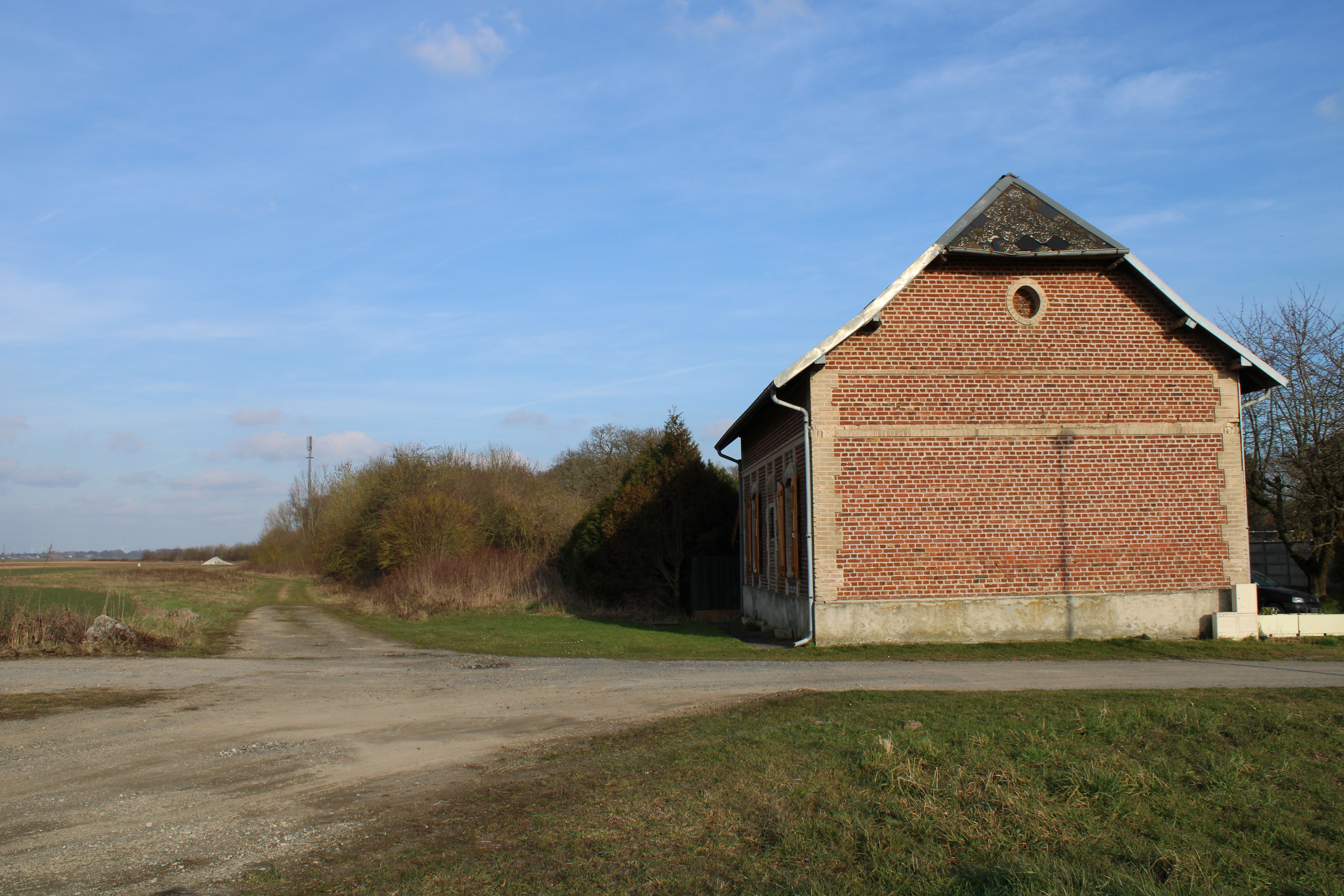 Emplacement de l'ancienne gare.